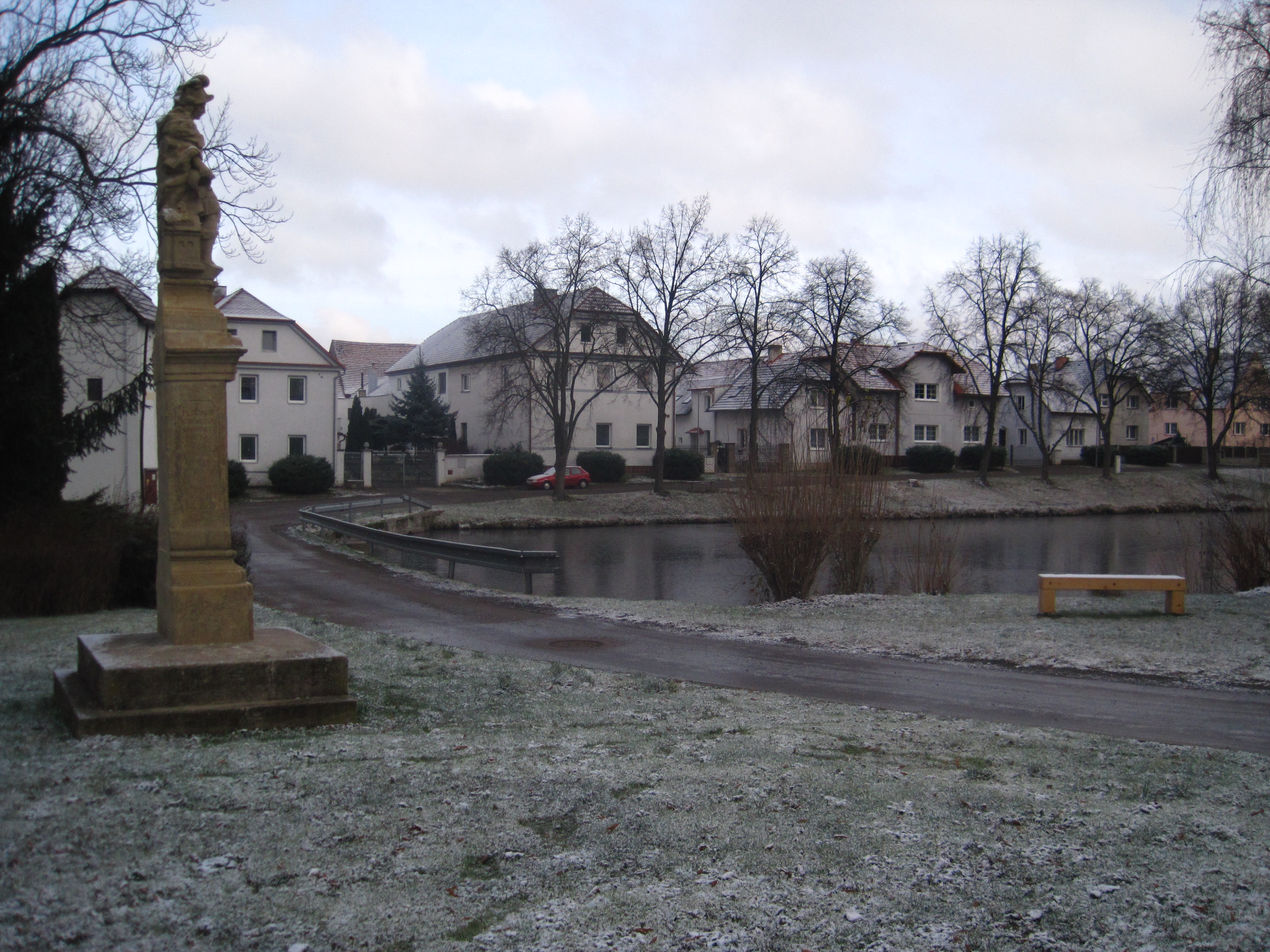 Socha svatého Floriána, náves, pp. 845/9, Veselá (Mnichovo Hradiště).